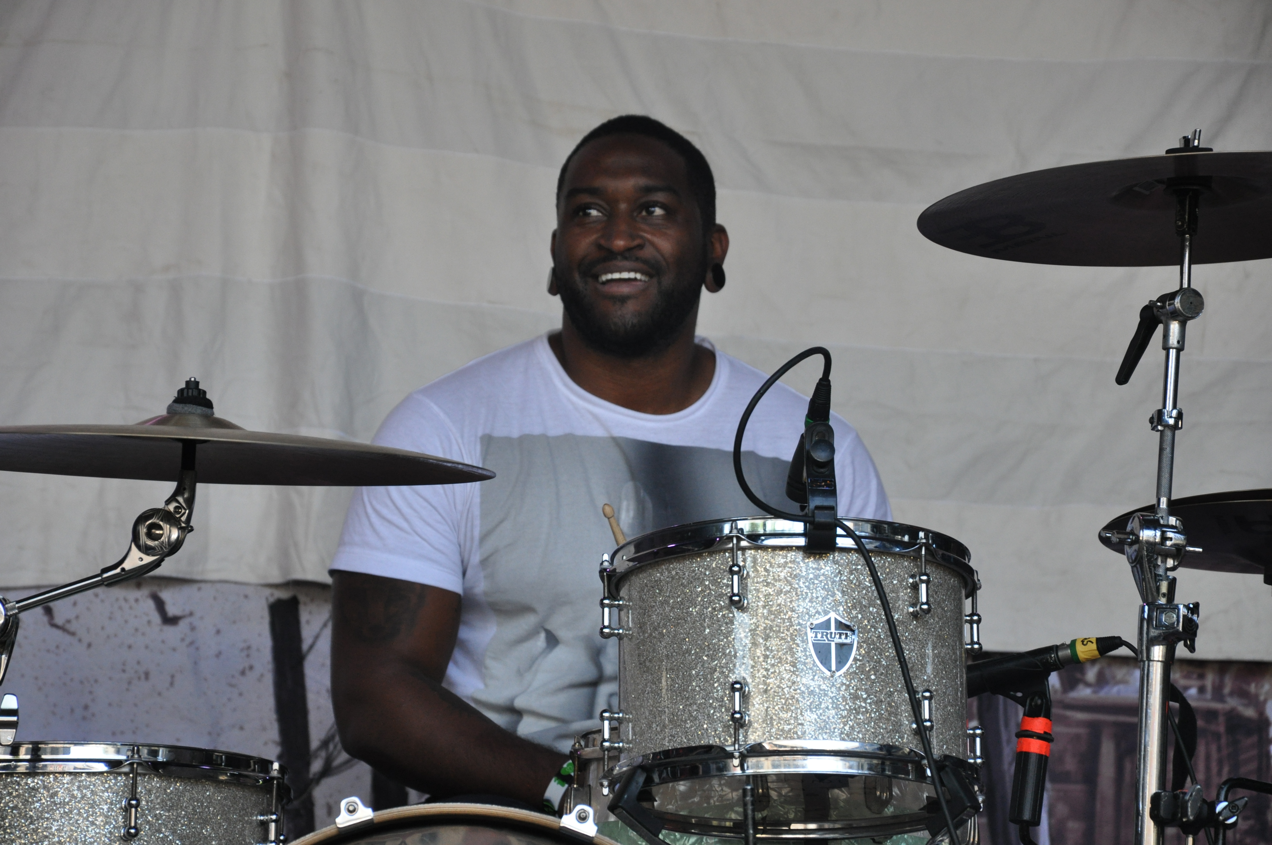 Letlive auf dem Summerblast Festival 2014